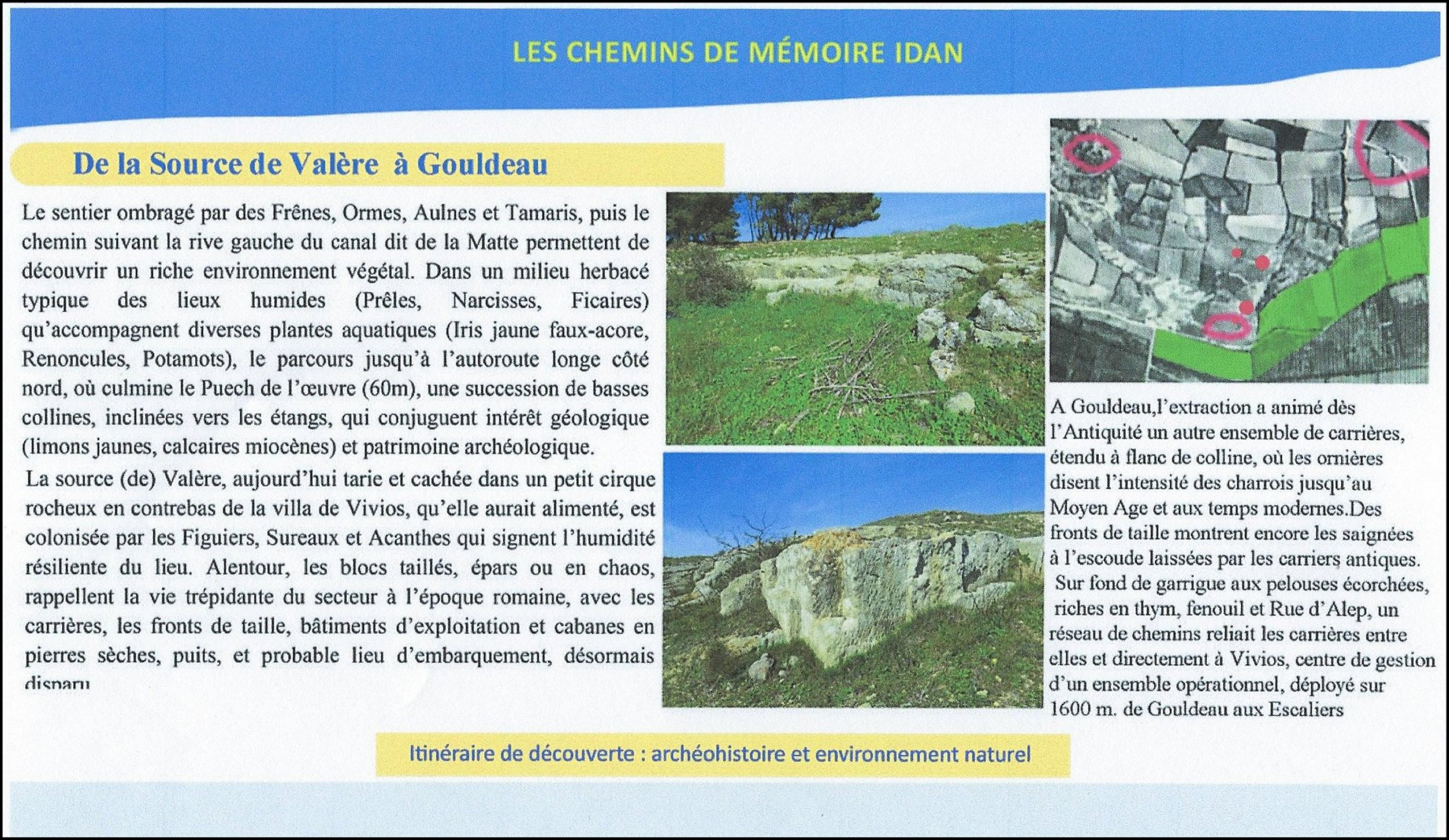 Lespignan (Occitanie : Hérault) : carrières de Gouldeau à partir de l'ex source Valère et environnement naturel